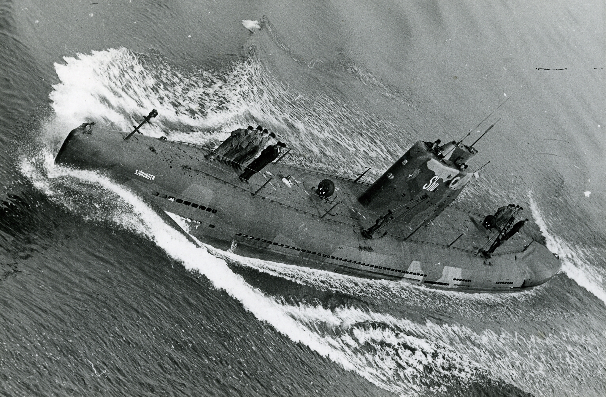 Den svenska ubåten HMS Sjöhunden.